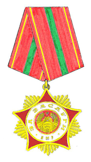 PMR state order